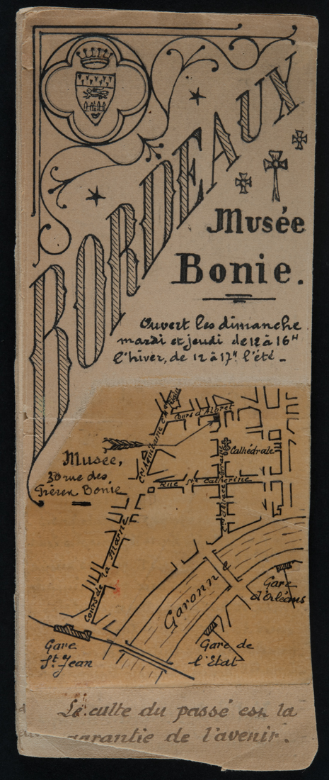 Affiche Musée Bonie avec plan de situation (cliché Lysiane Gauthier, ville de Bordeaux).